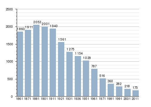 Evolution démographique de Prazzo